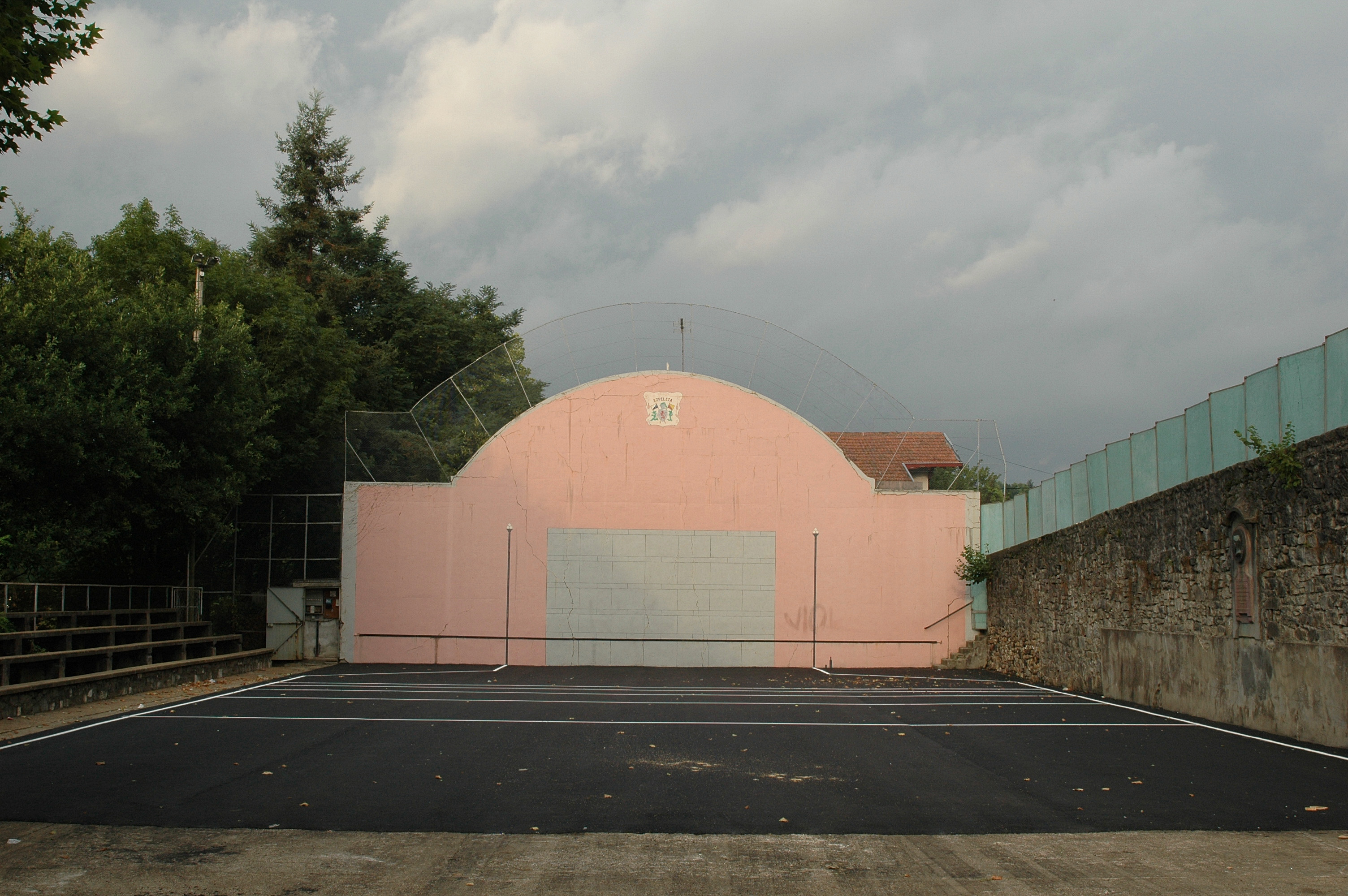 Espelette, le fronton. Photo prise le 08/08/06 par Harrieta171